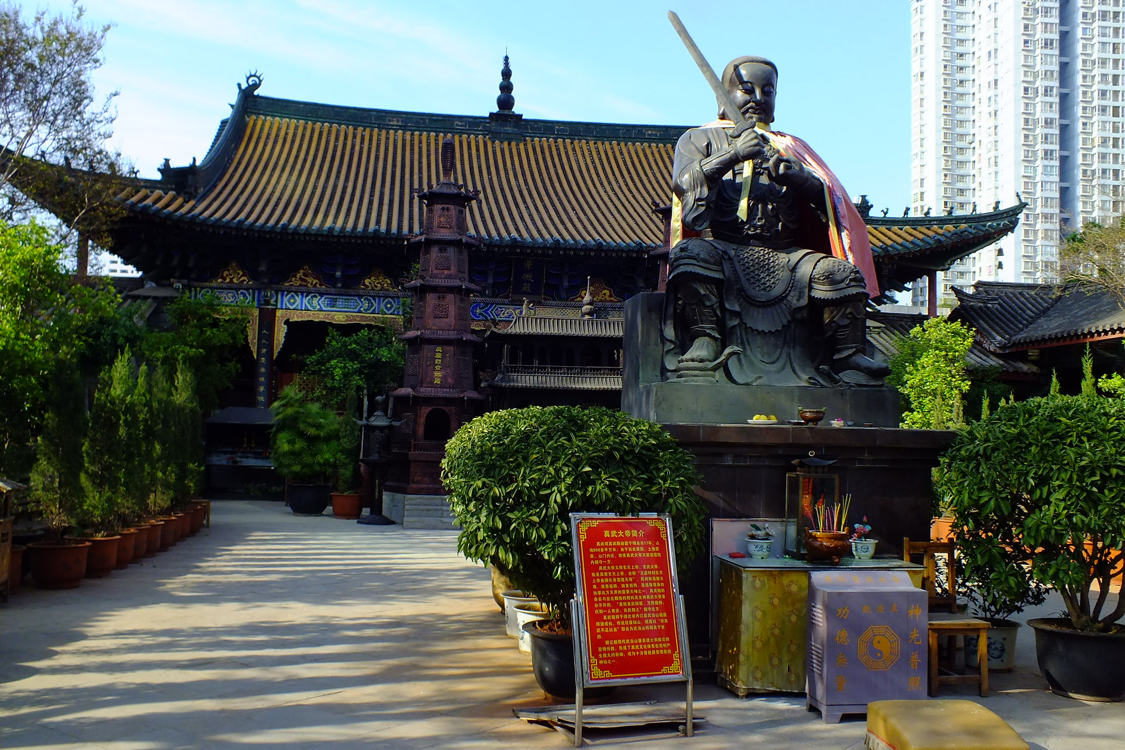 真庆观（真慶観） 紫微殿 中国云南省昆明市盘龙区拓东路82号